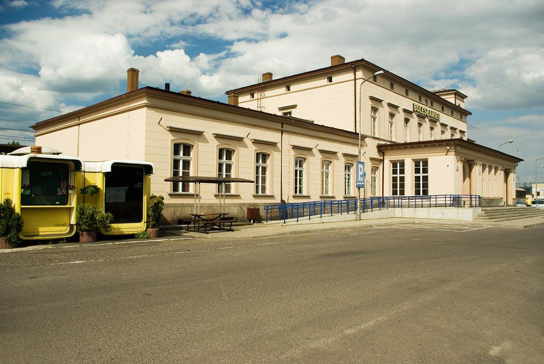 Dworzec kolejowy w Bolesławcu.